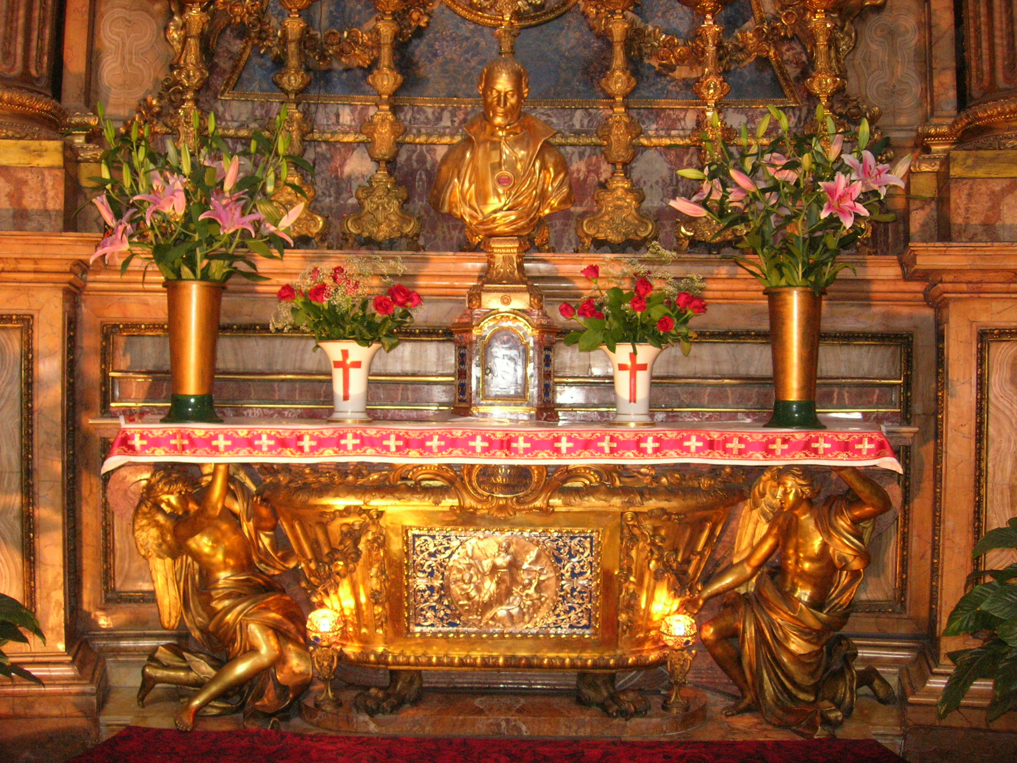 Urna y altar con la tumba de San Camilo de Lellis, esculpida y pintada por Giardoni y Consalvi con motivo de la beatificación en 1742. Santa Maria Magdalena de Roma